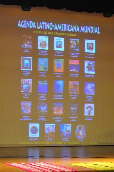 Presentación de la Agenda Latinoamericana 2015 en São Paulo.